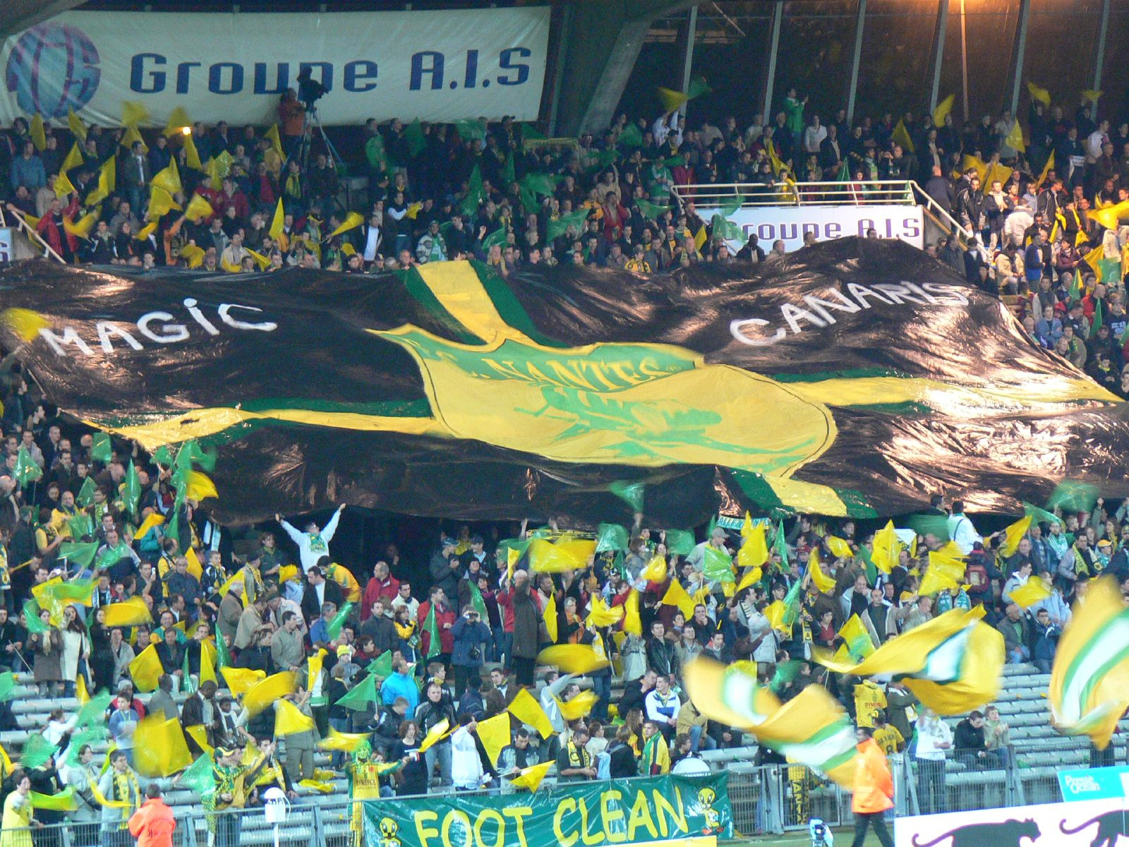 TIFO FC Nantes Atlantique